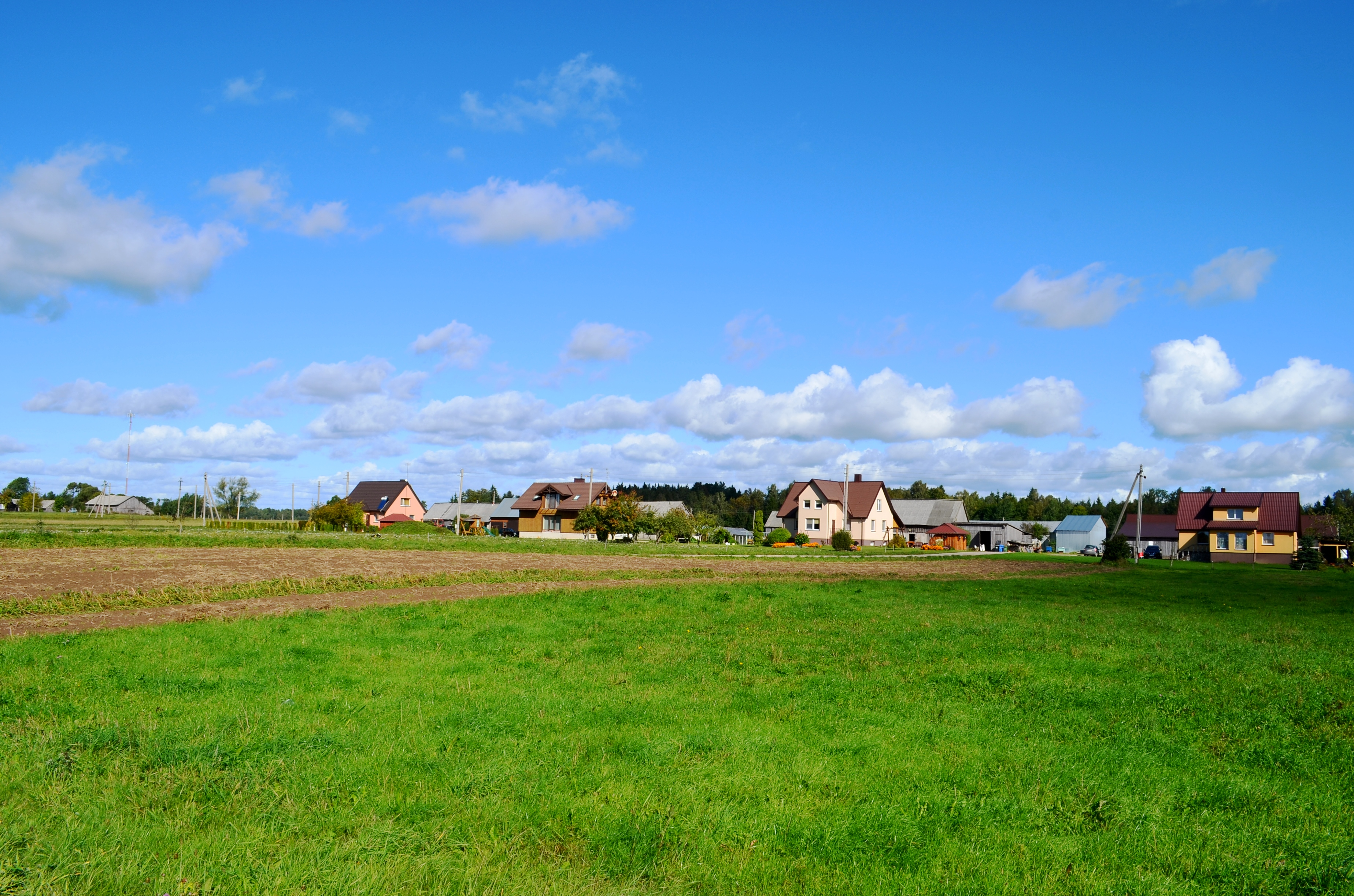 Žemaitėška: Guorānē, Šėlotės rajuons